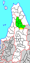 北海道中川郡（天塩国）の位置。